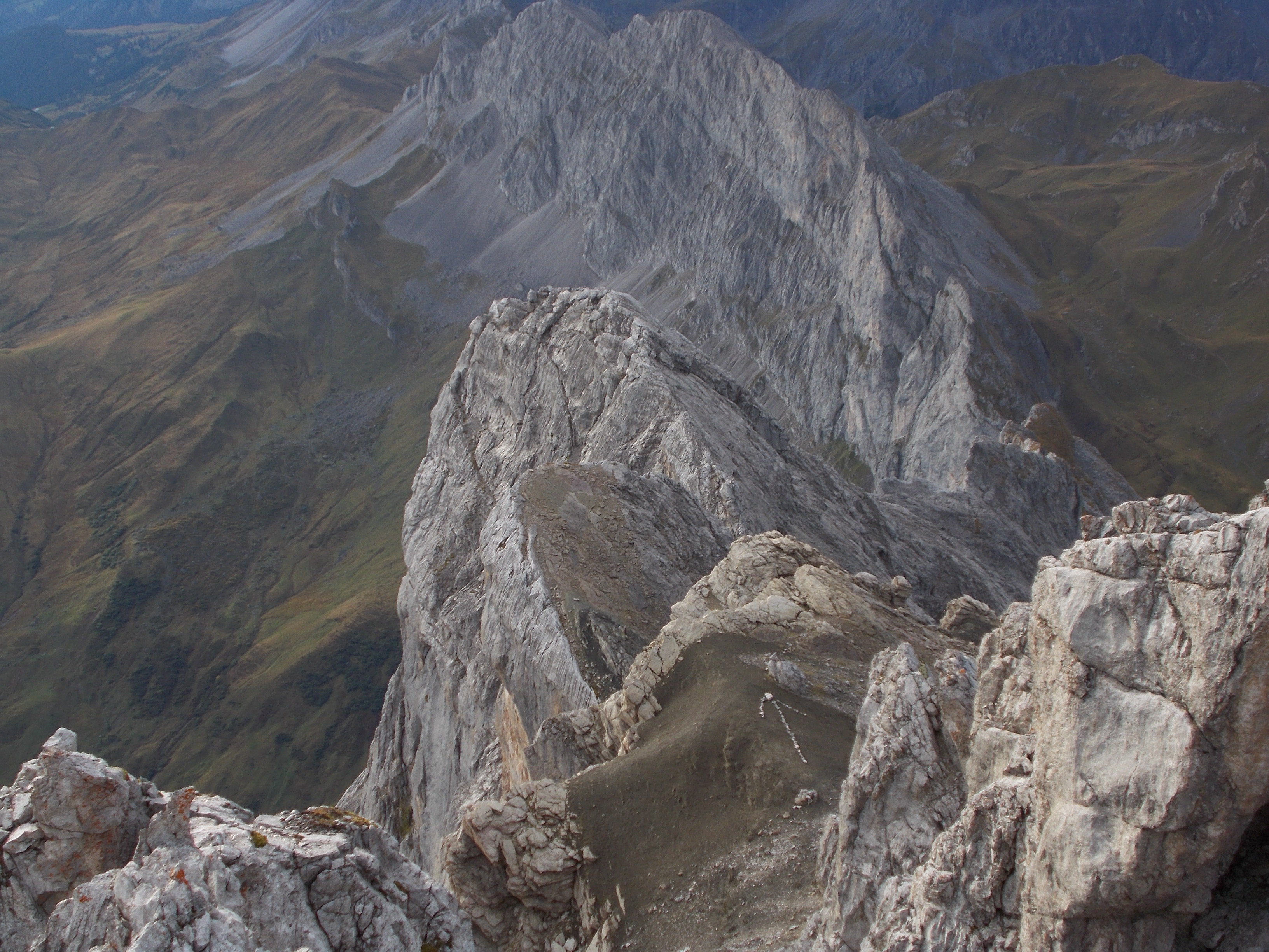 Blick vom Gipfel des Drusenfluh auf Zudrells Erstbesteigungsroute. Der Pfeil weist den Weg zum Abstieg auf das Zudrellband.